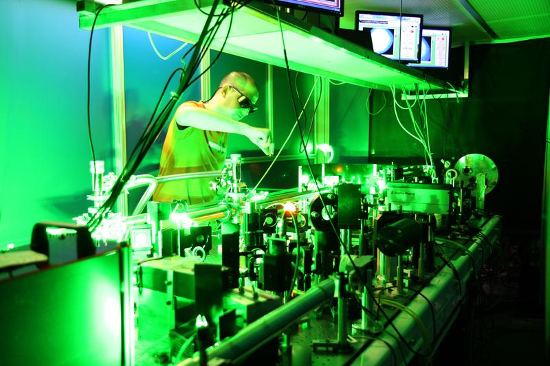 Le Laboratoire d'Optique Appliquée (LOA) est une UMR (Unité Mixte de Recherches) ENSTA-Paris Tech - CNRS - École Polytechnique. Ses activités de recherche couvrent un large spectre scientifique centré sur le développement et les applications de sources lasers ultrabrefs, la physique de l'interaction laser-matière et des plasmas, ainsi que la production de sources compactes de rayonnements et de particules énergétiques.